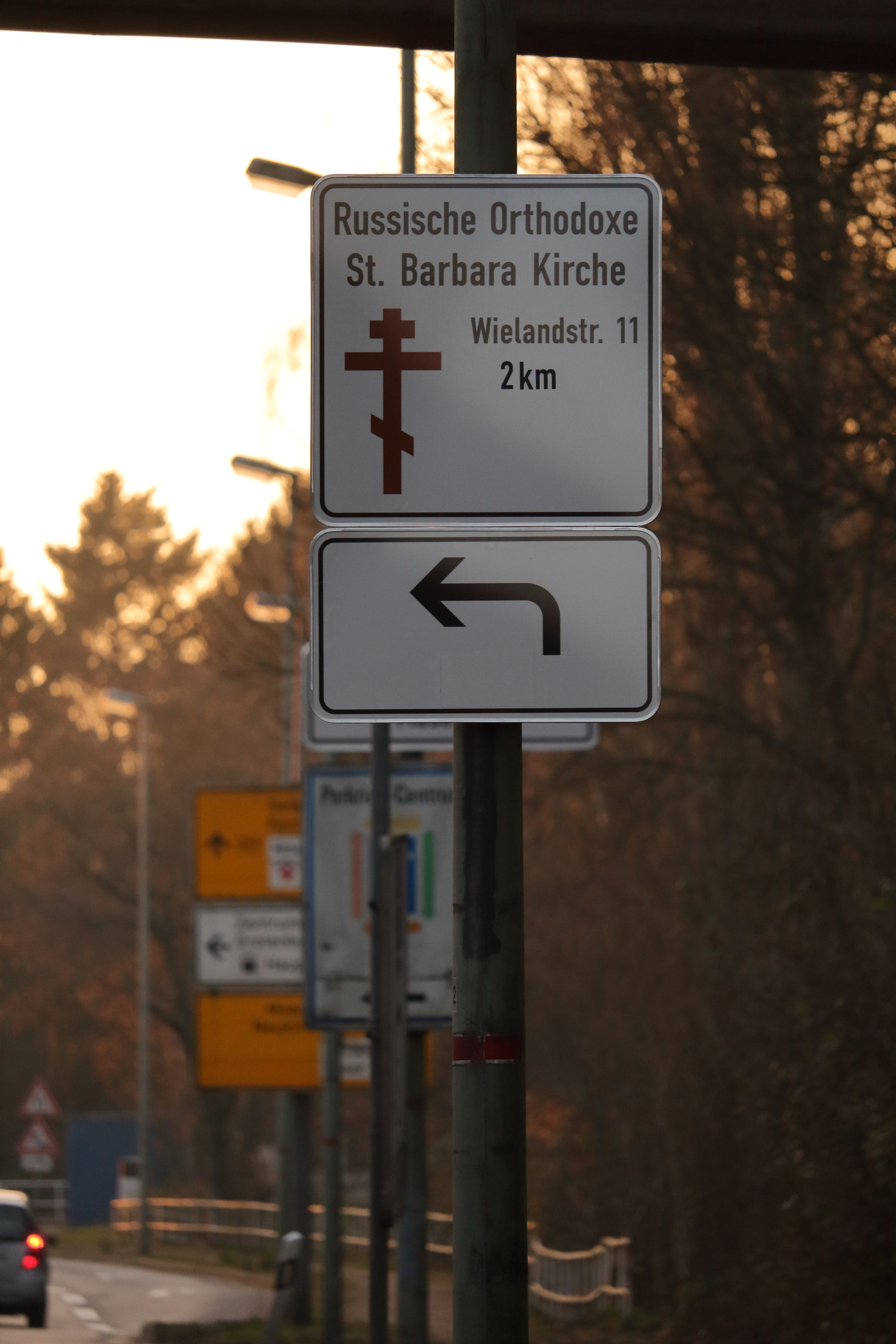 Hinweisschild, Russische Orthodoxe St. Barbara Kirche Krefeld